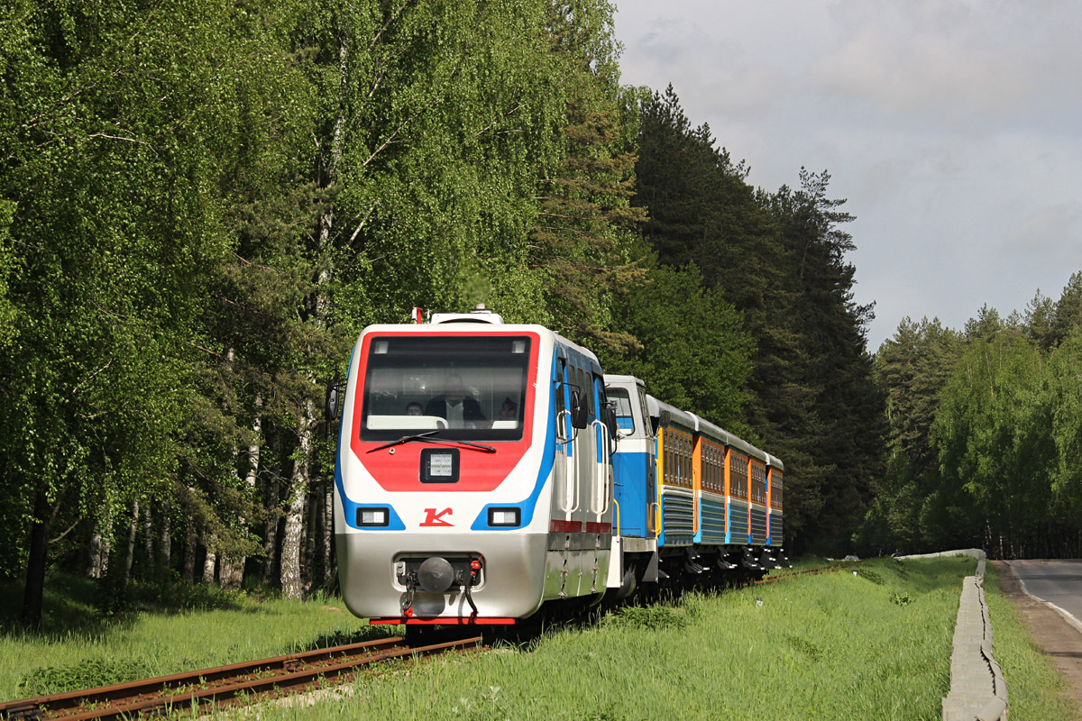 17 января 2014 г. был доставлен на Ярославскую ДЖД. Со 2-го мая в регулярном движении.